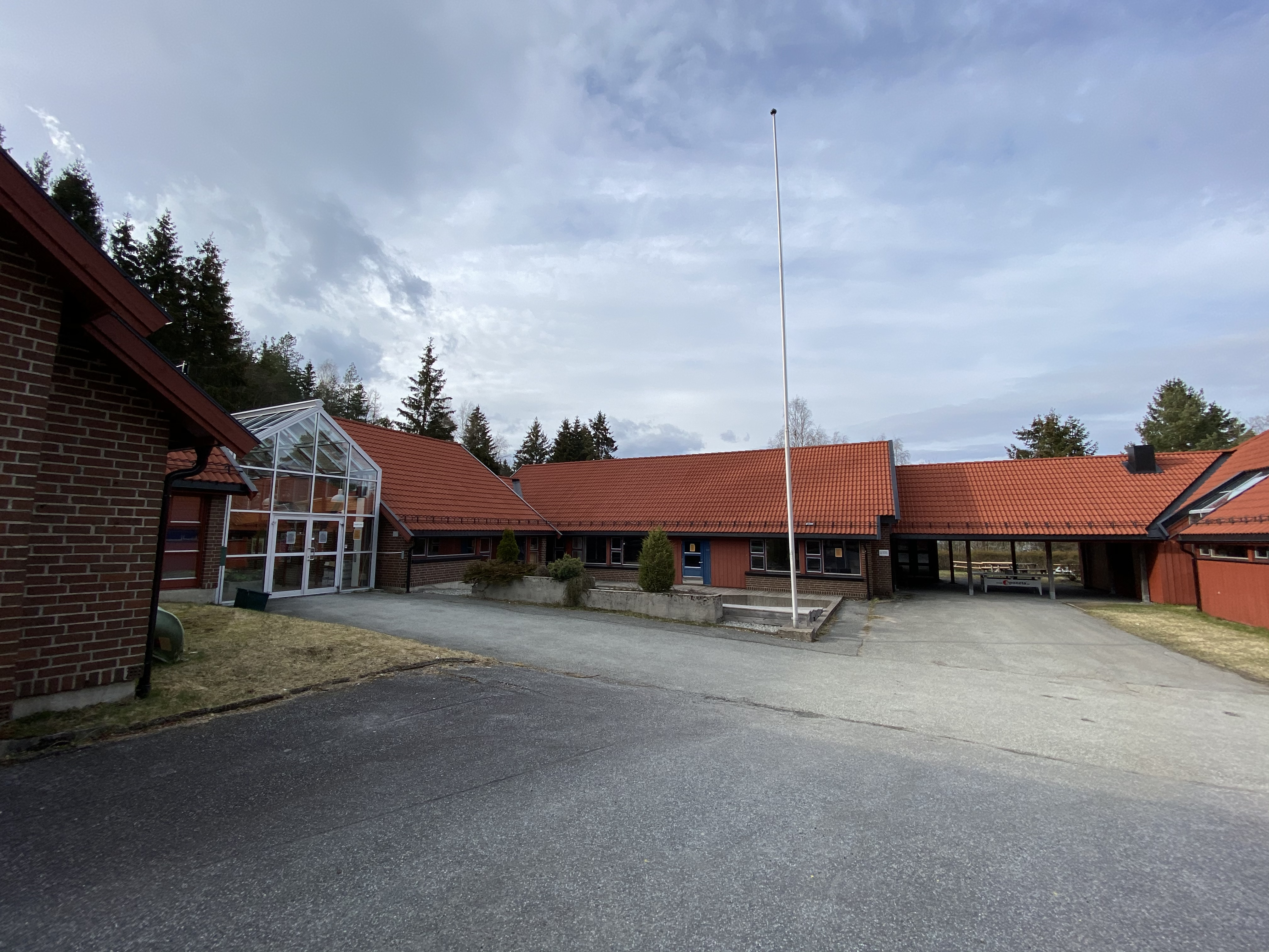 Skolegården på Sætre ungdomsskole, Asker.